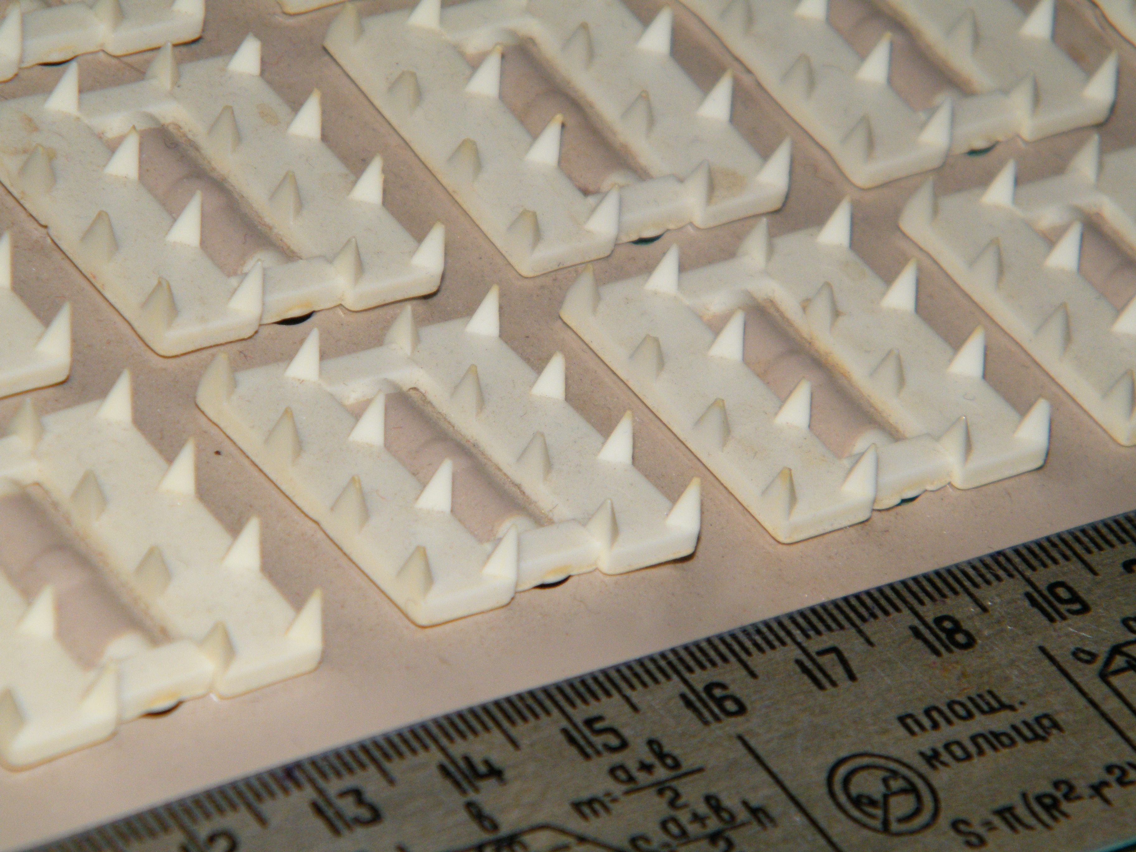 Ипликатор Кузнецова. Благодаря ипликатору Кузнецова мой домашний кот не спит на клавиатуре компьютера.